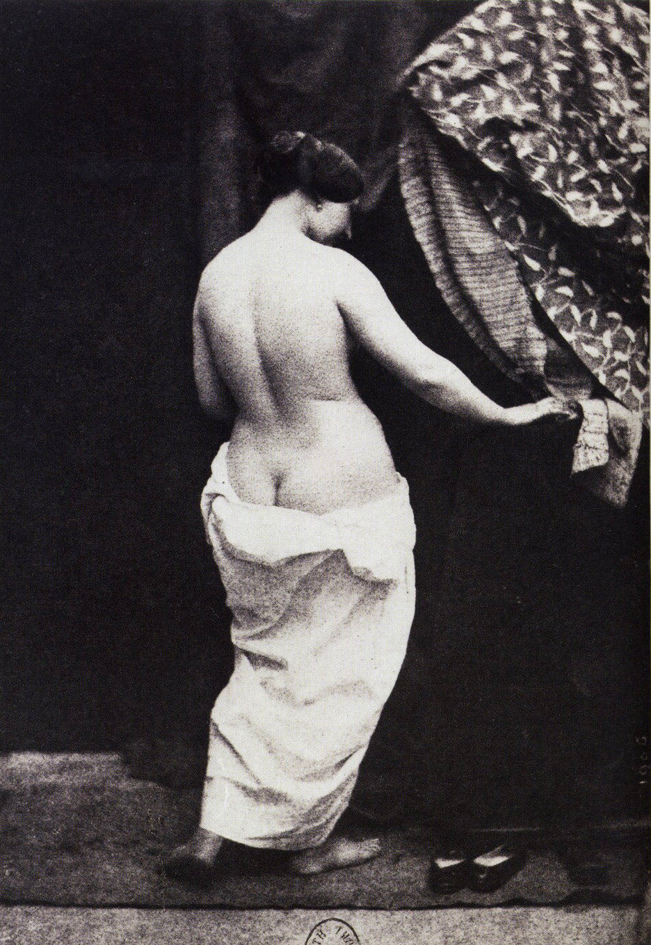 Étude d'après nature, nu n°1906, modèle pour « Les Baigneuses » Print on salted paper from a paper negative 16.5x12.3 cm Bibliothèque nationale de France, département des Estampes et de la Photographie, Eo9 t 3